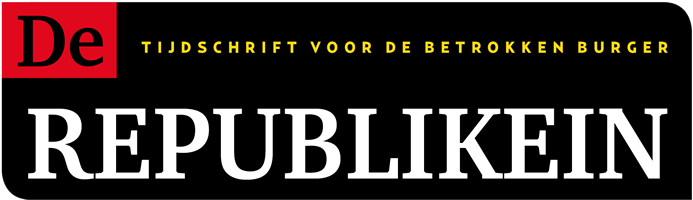 Logo van het Nederlands republikeins tijdschrift De Republikein, "tijdschrift voor de ware democraat".